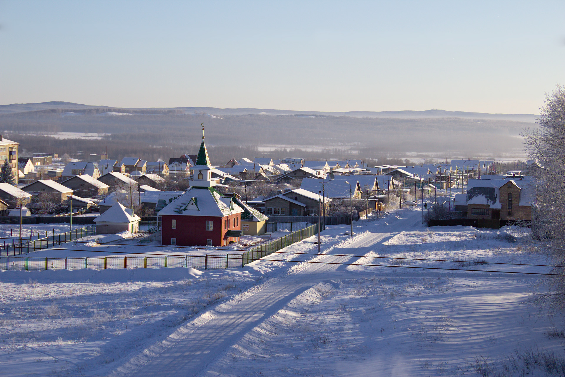 Поселковая мечеть